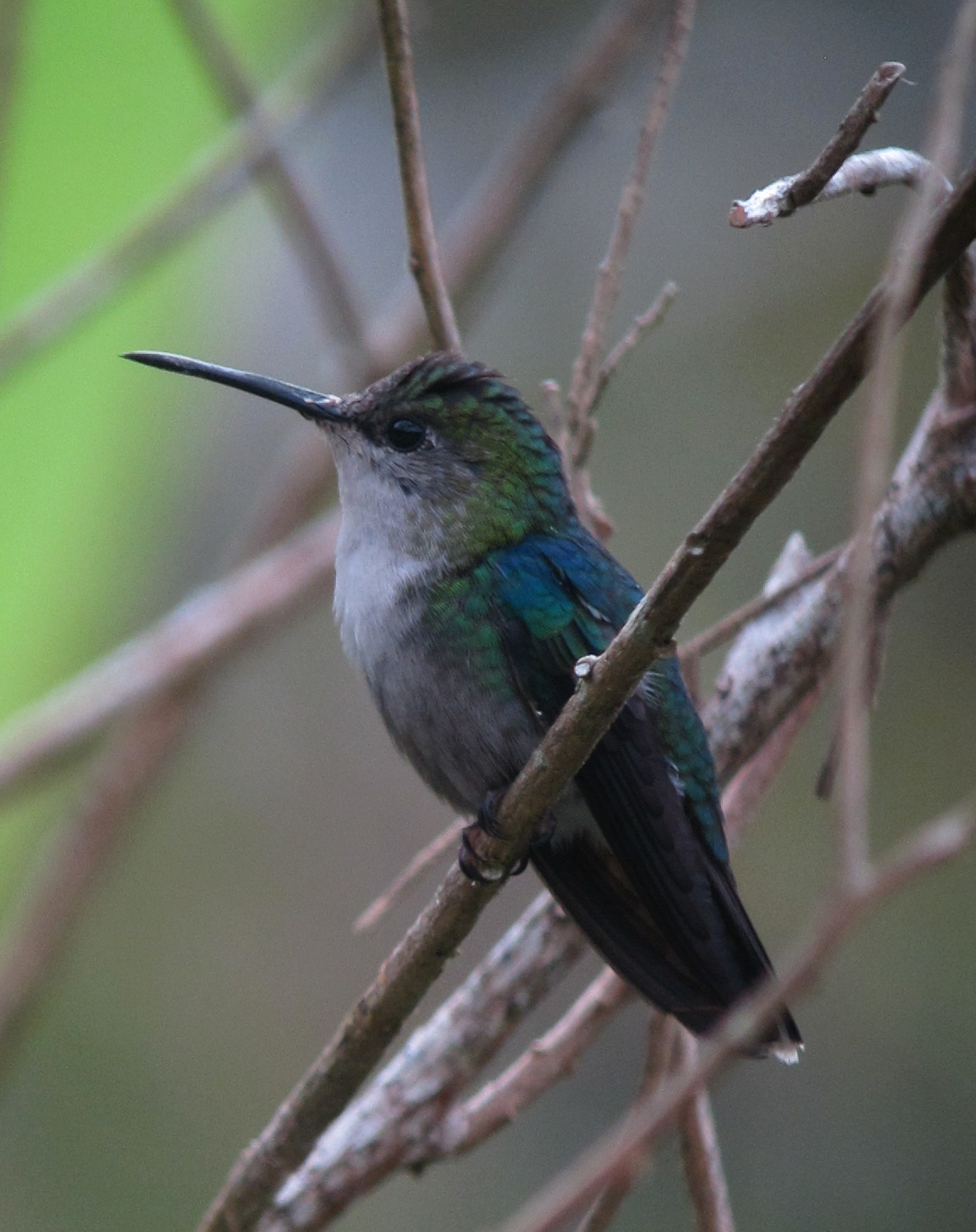 Anorí, Antioquia, Colombia ( RNA Arrierito de Proaves )